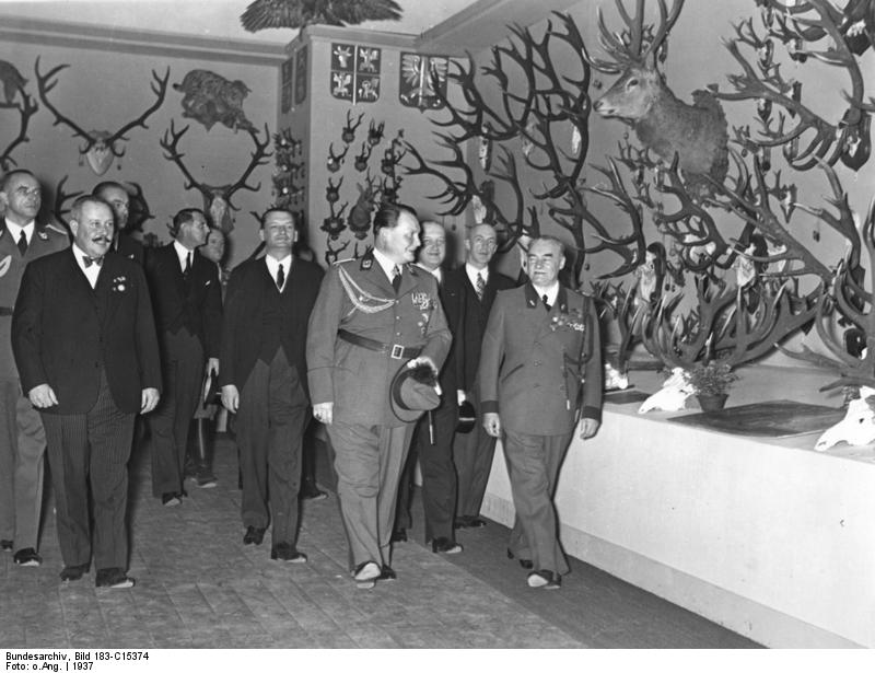 Berlin, Internationale Jagdausstellung Eröffnung der internationalen Jagdausstellung 1937 in den Ausstellungshallen des Kaiserdamm Nach der Eröffnung unternahm Ministerpräsident Göring einen Rundgang durch die Ausstellung. Unser Bild zeigt ihn in der polnischen Abteilung. Abgebildete Personen: Göring, Hermann: Reichsmarschall, Oberbefehlshaber der Luftwaffe, Ministerpräsident von Preußen, Deutschland